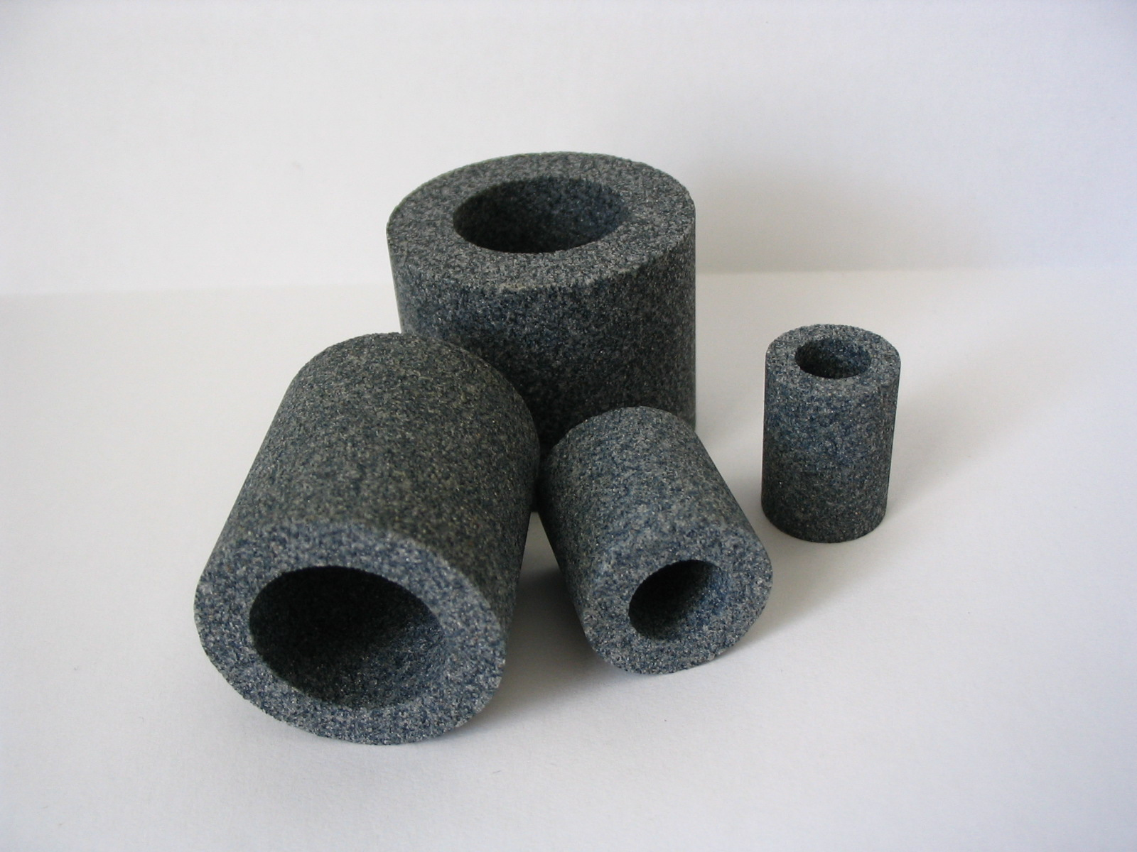 Grinding Wheels / Schleifscheiben